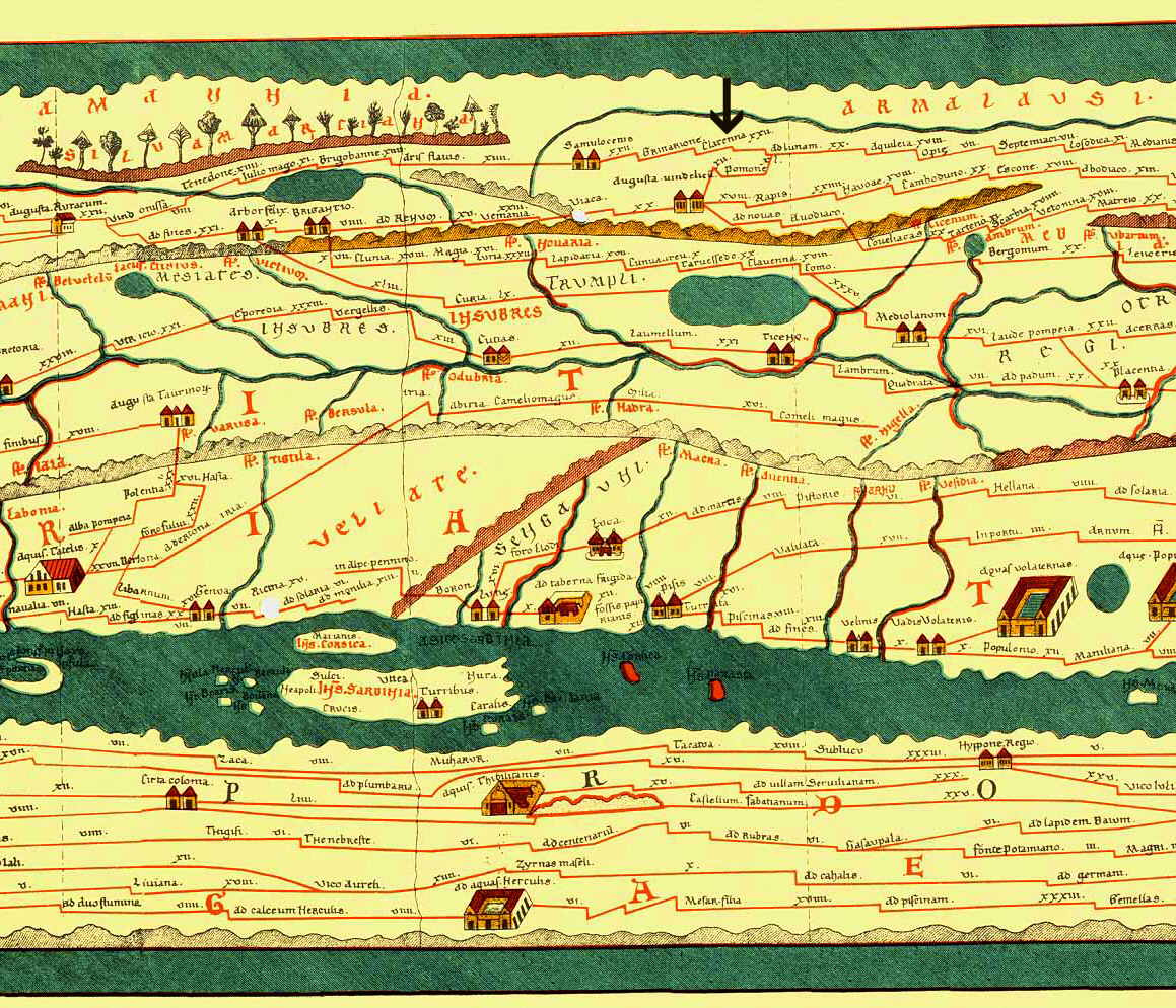 Ausschnitt aus der Tabula Peutingeriana mit Donnstetten als CLARENNA Pfeil oben Mitte, zwischen GRINARIONE und AD LUNAM